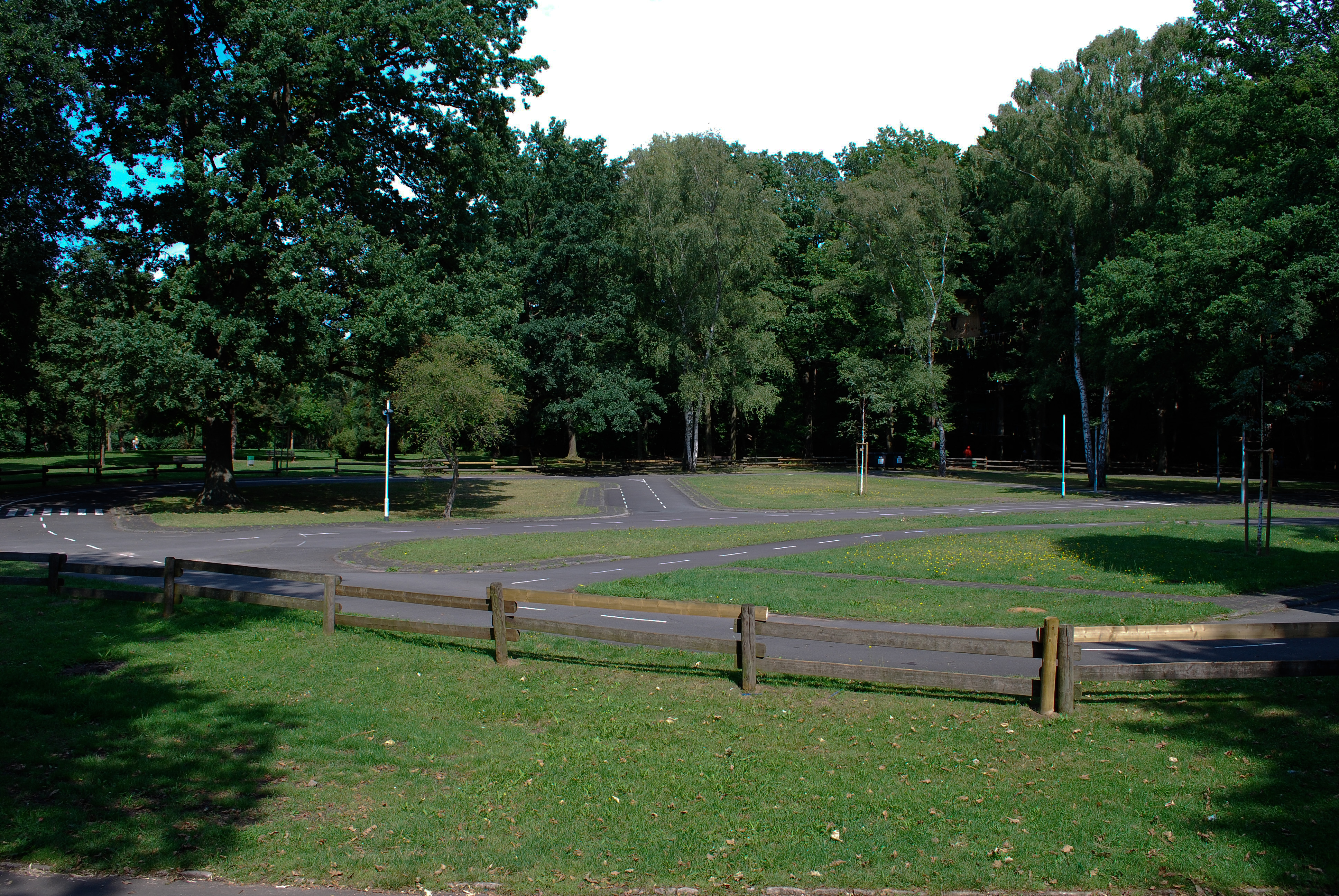 Leonhard-Eißnert-Park in Offenbach am Main - Jugendverkehrsschule